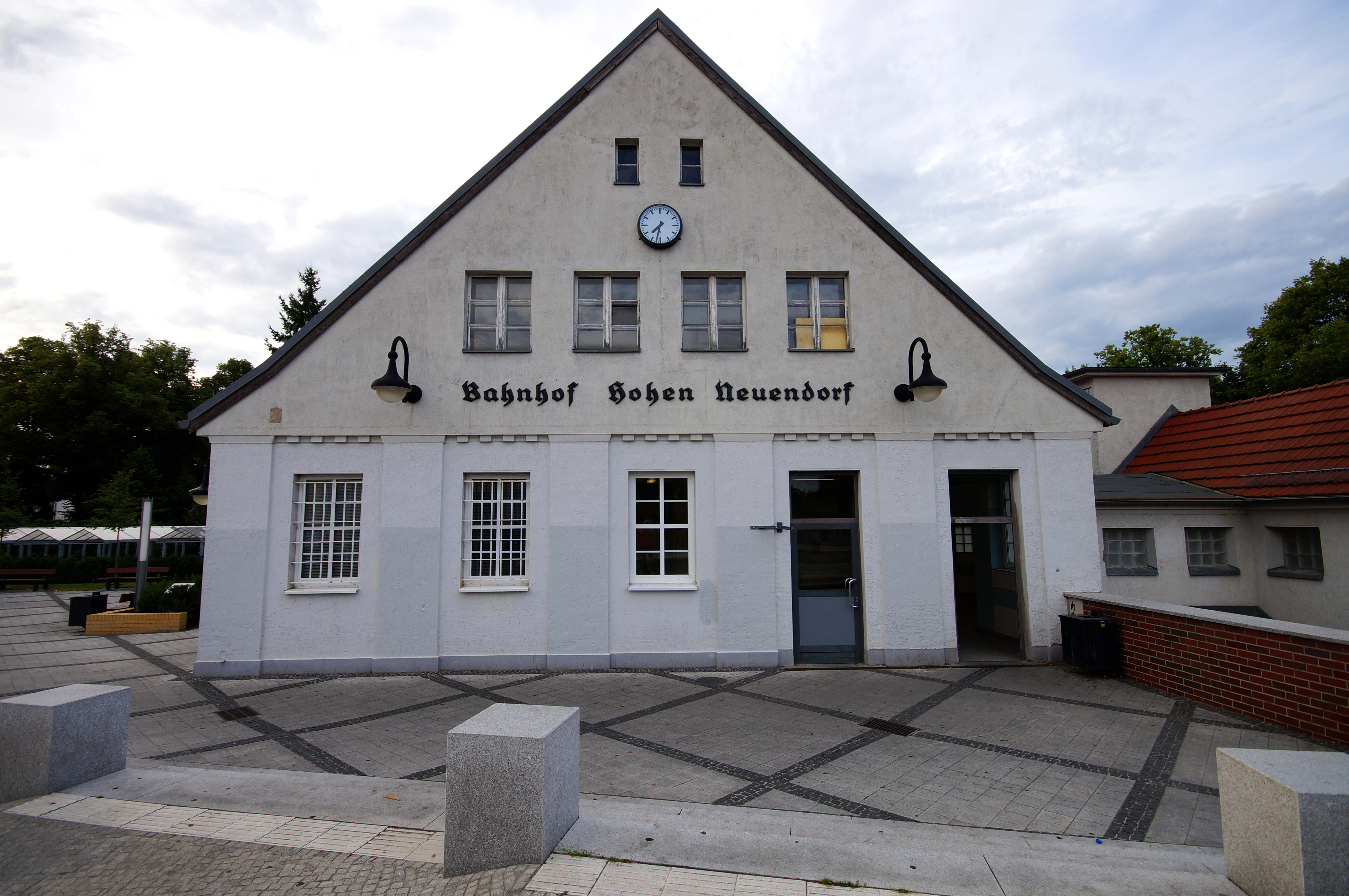 Der Haupteingang des Bahnhofsgebäudes des Bahnhofs Hohen Neuendorf (b Berlin)